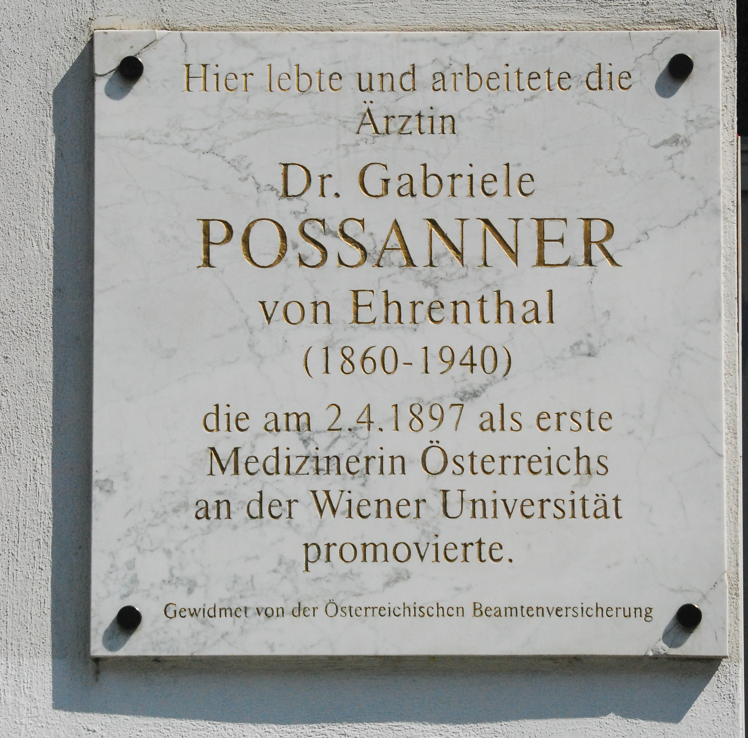 Gedenktafel für Gabriele Possanner in Wien-Alsergrund (Alser Straße)